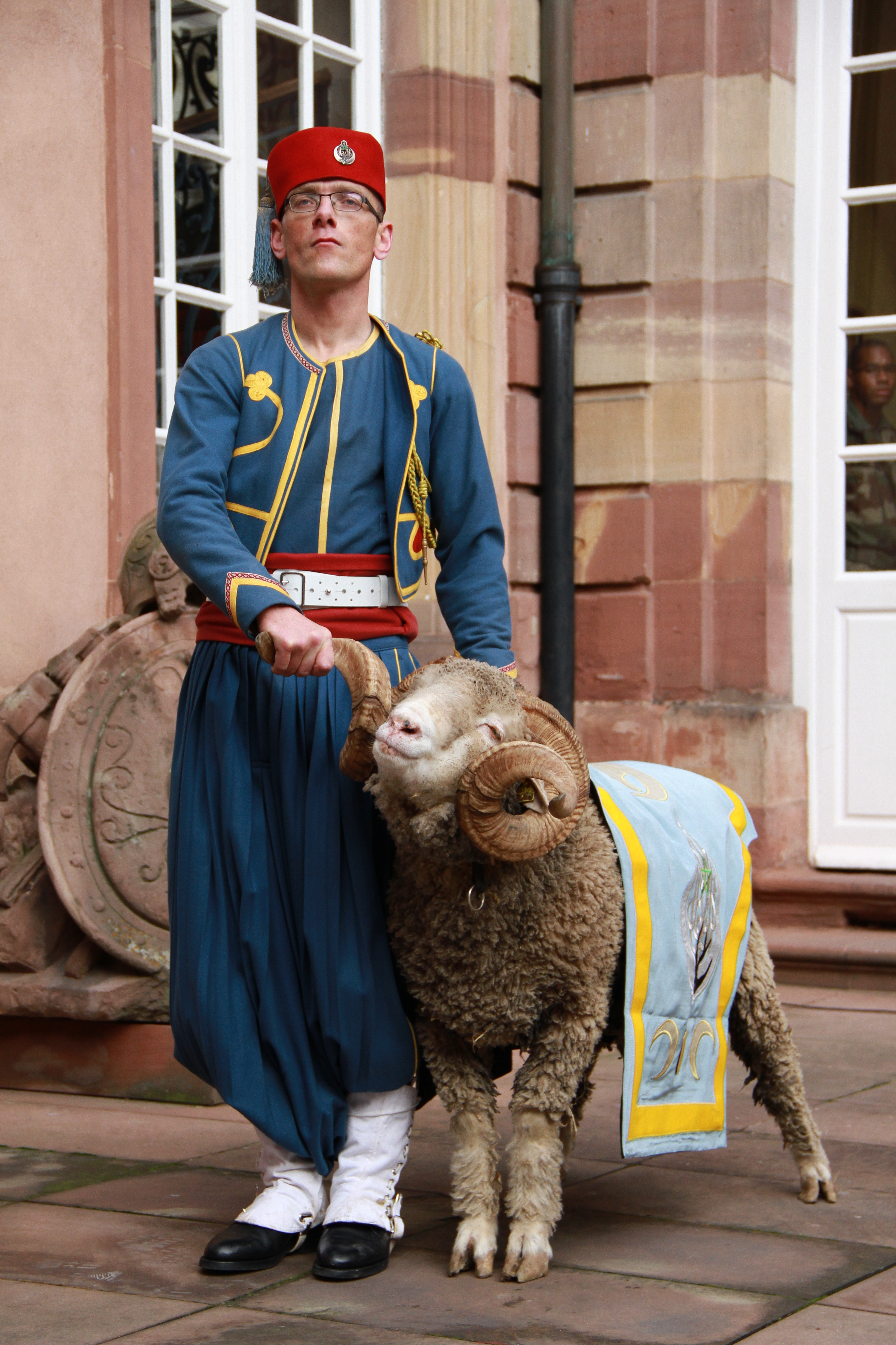 La Nouba du 1er Régiment de Tirailleurs d'Épinal en tenue de Tradition lors de la prise d'armes au Palais du gouverneur militaire de Strasbourg, le 31 janvier 2013, en présence du général Bertrand Ract-Madoux, chef d’état-major de l’armée de terre à l’occasion du retour en France de la Task force Lafayette.